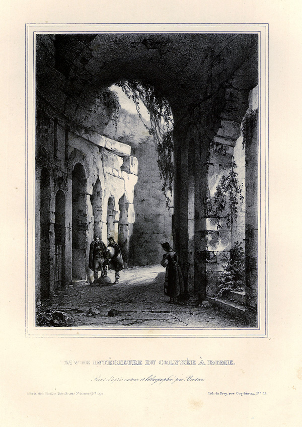 Colosseum, from: Six Vues intérieures du Colysée peintes à Rome d'apres nature par Mr. Bouton et lithographiées par M. Mrs. Bouton et Jaime. à Paris, Chez Chaillou Potrelle, Marchand d'Estampes, rue St. Honoré, No. 140. Lith. de Frey, rue Coq-héron, No. 11.